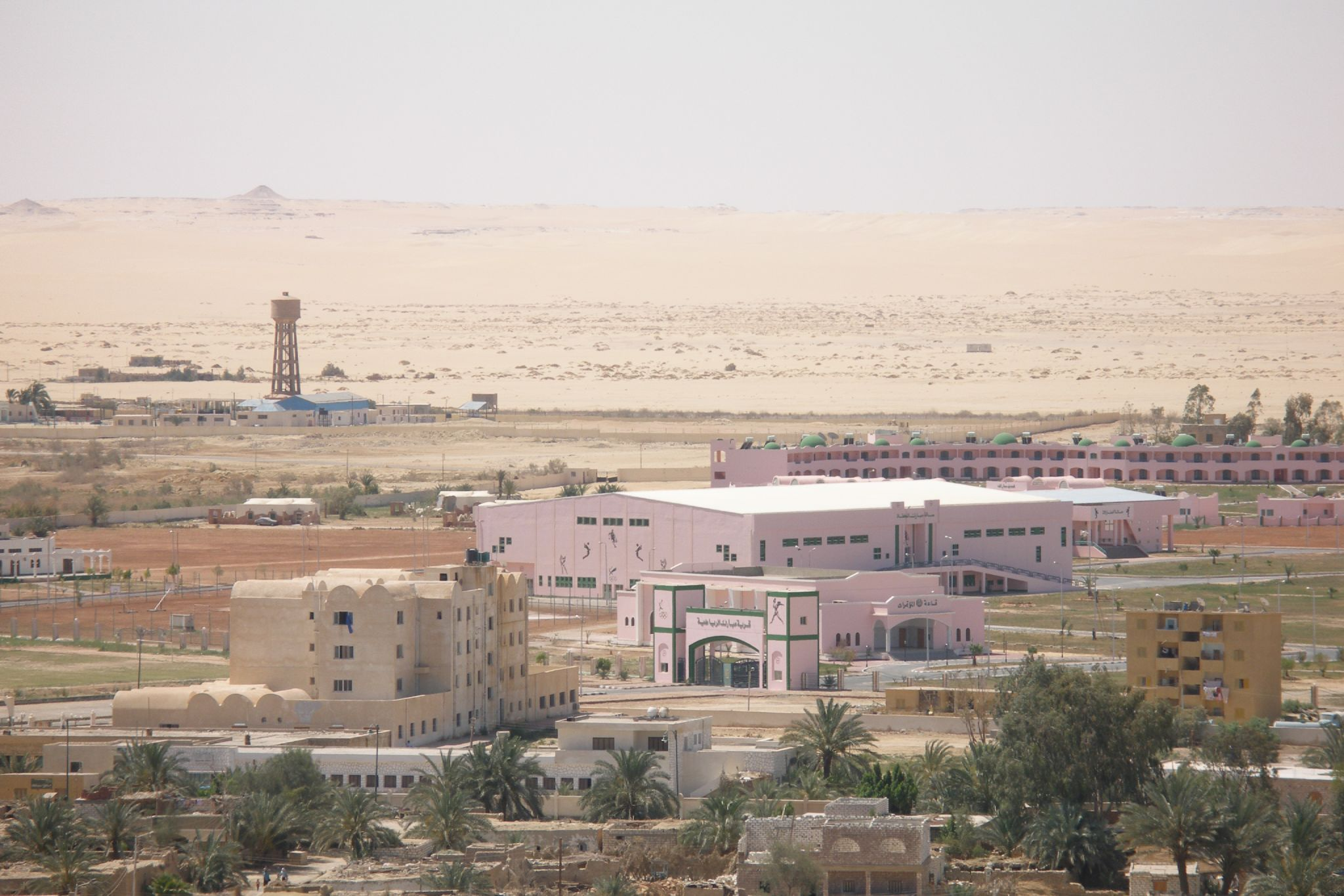 Oasis Siwa, Egypt (2007-05-073)